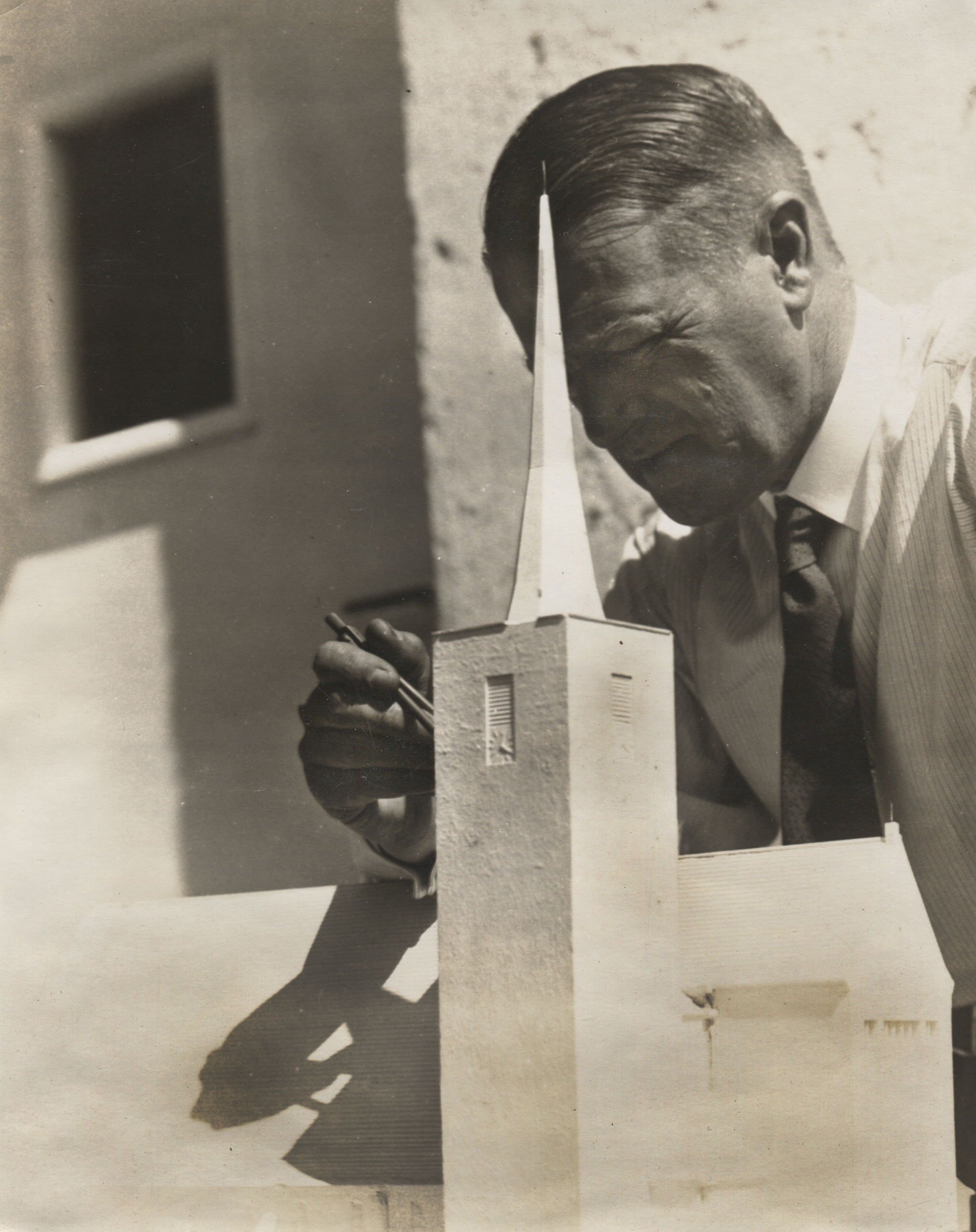 Professor Adolf Muesmann mit dem Modell der Kirche Rosenheim